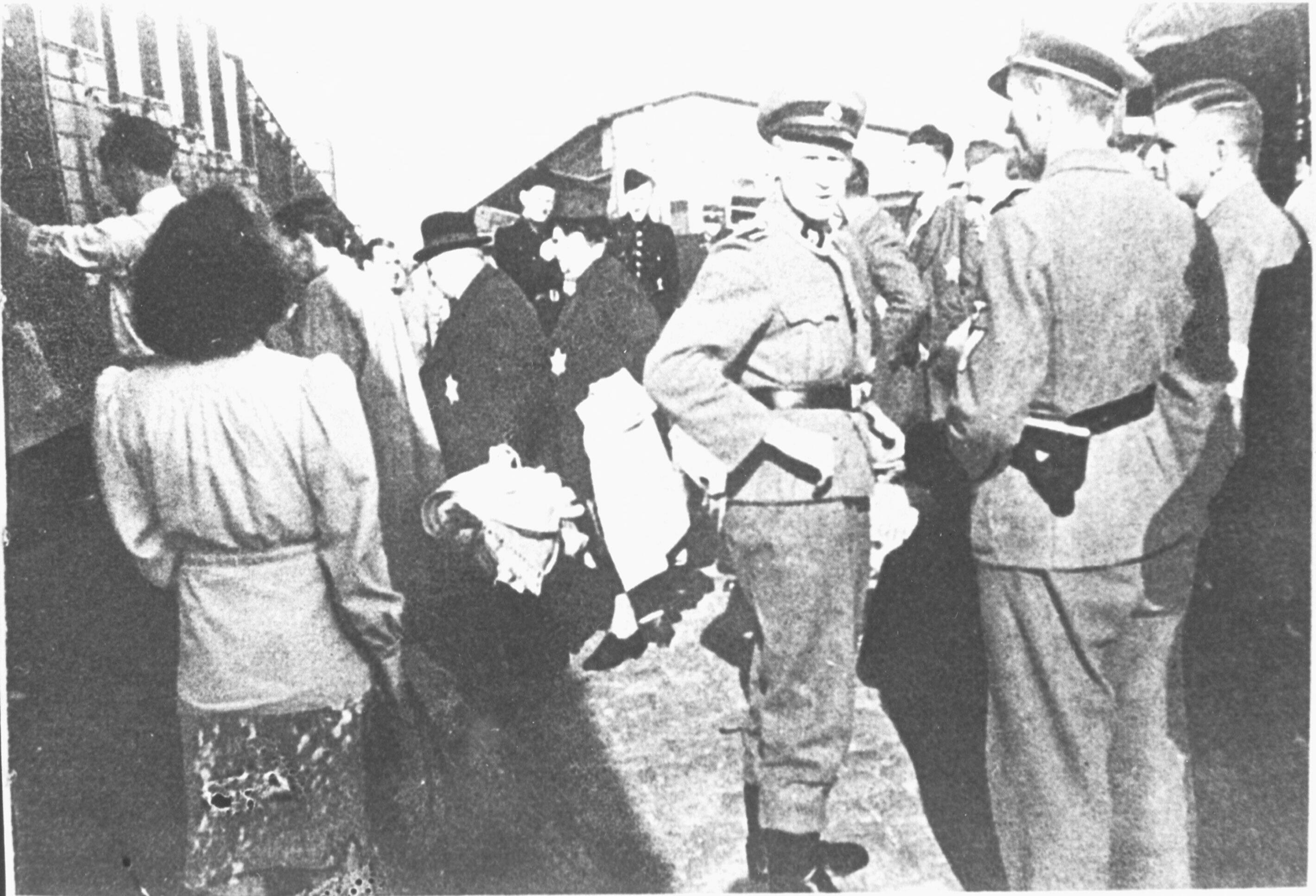 Deportatie Joden, zomer 1943. Panamakade, Oostelijk Havengebied, in Amsterdam. Het gebouw is Loods III.